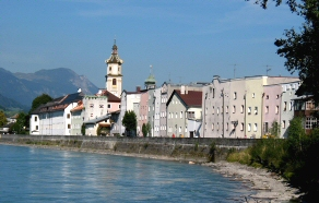 Stadt Rattenberg in Tirol - Foto von Anton Prock